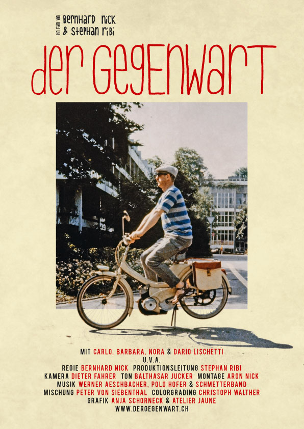 Filmplakat zum Film Der Gegenwart